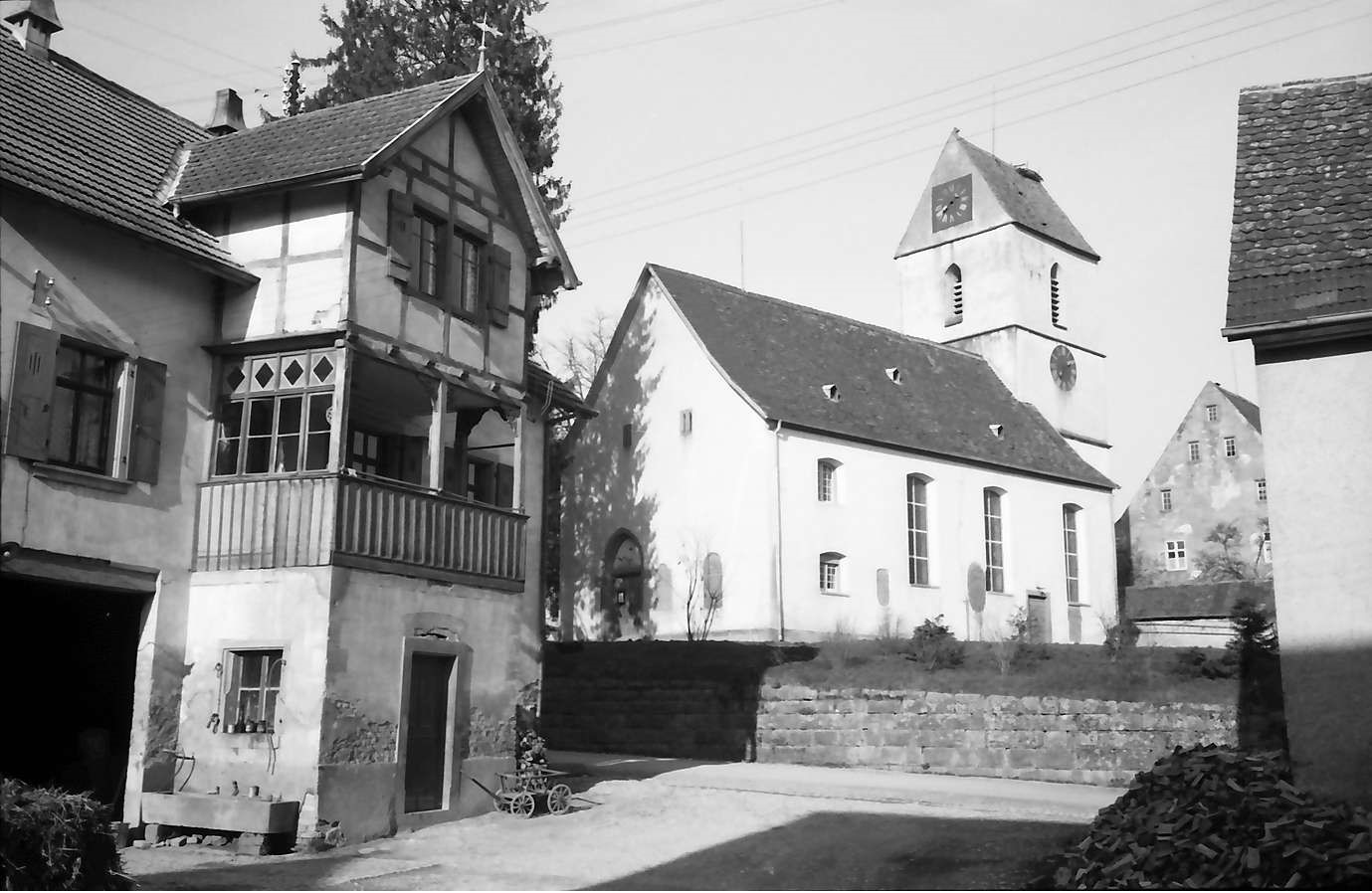 Tannenkirch: Evangelische Kirche aus einem Hof gesehen